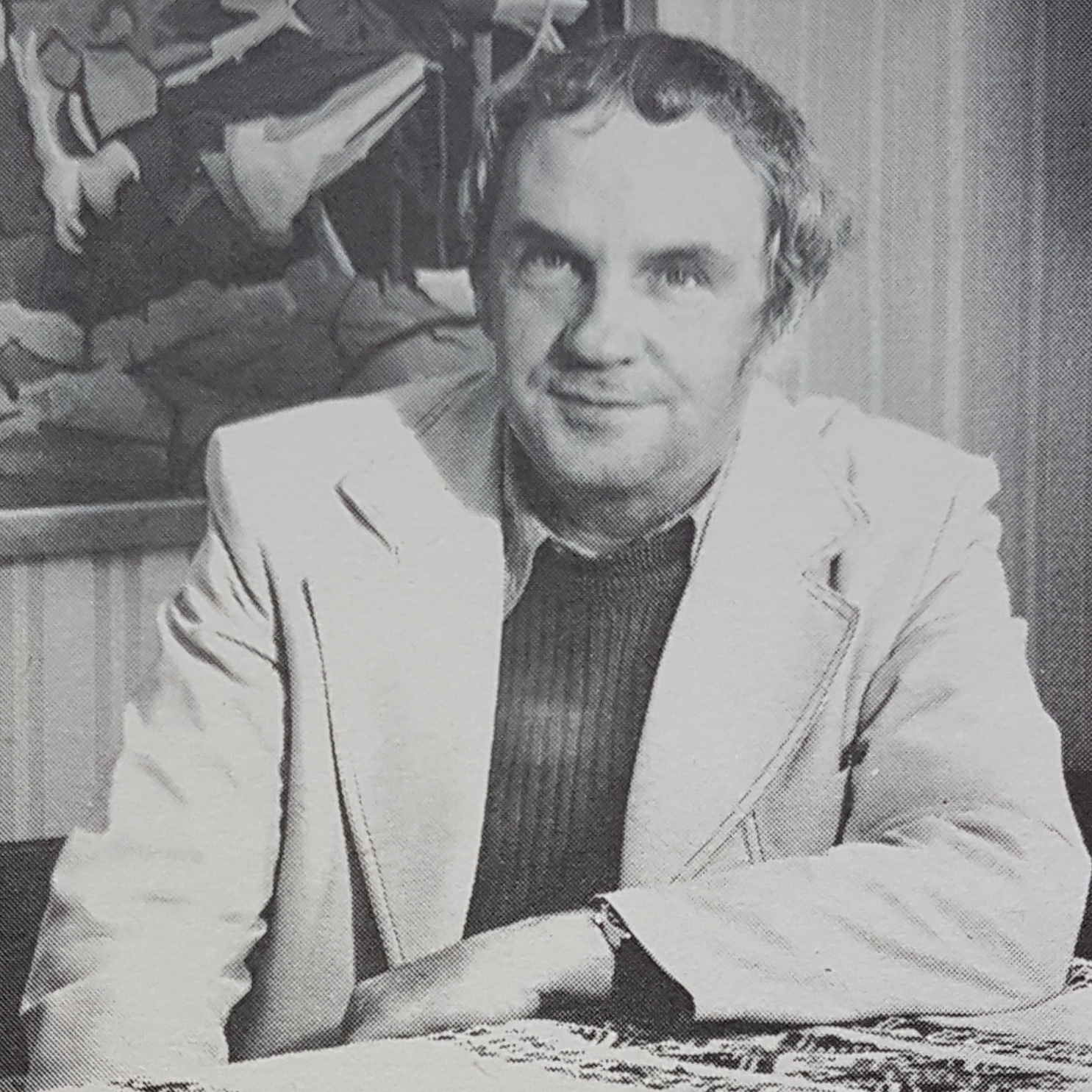 Tor Ivar Andersson Artist from Sweden